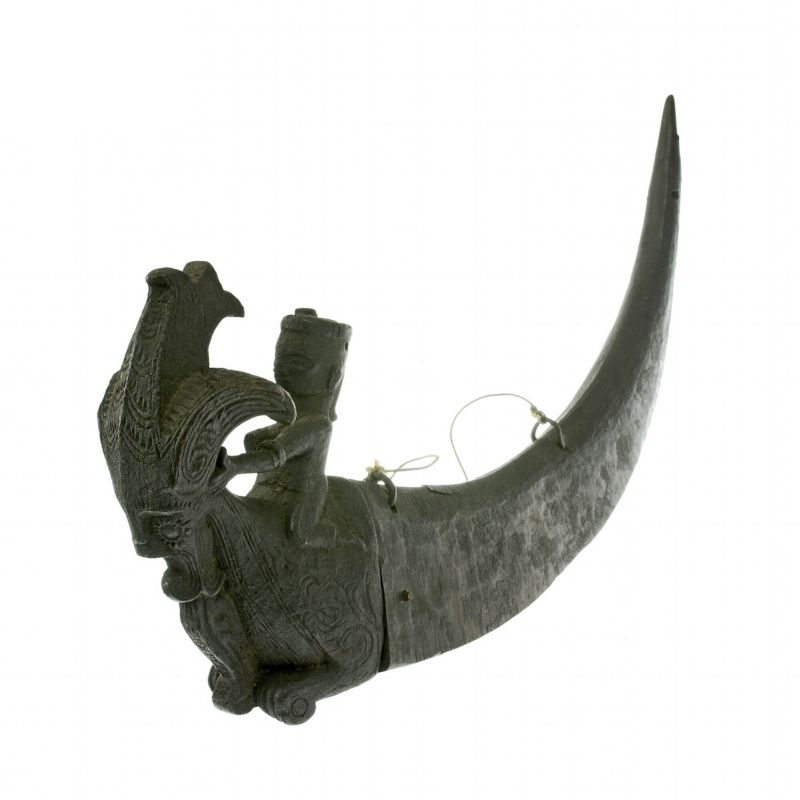 Medicijnhouder. Houder voor de opslag van pupuk. Pupuk is een tovermiddel dat afweerbeelden, beschermbeelden en toverstaven een magische kracht geeft. Priester-genezers die in het bezit waren van pupuk hadden meerdere houders om pupuk in te bewaren, zoals potjes van hout, porselein of lood en uitgeholde hoorns van een waterbuffel of van een berggeit. De houders waren vaak rijk versierd met uitgesneden mens- en dierfiguren. Pupuk verkreeg de datu door een uit een naburig dorp ontvoerd kind in te graven tot het hoofd. Nadat het kind had gezworen zich in te zetten voor het welzijn van het dorp, goot de datu vloeibaar lood in de mond van het kind. Op deze wijze wist de datu de geest van het kind voor zich te laten werken. Uit het lichaam van het dode kind werd de pupuk gemaakt (Sibeth 1991: 136, 138).. Toverhoorn voor de opslag van pupuk Unknown language: Naga Marsarang